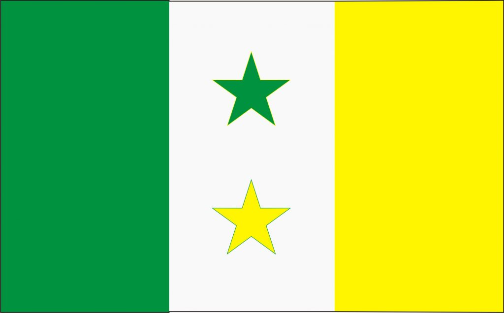 El primer tercio de color verde simboliza la naturaleza, la flora y la agricultura del municipio. El segundo tercio en blanco, que sirve de balance entre los dos colores de los extremos (verde y amarillo), simboliza las garzas, el liquilique y los derivados lácteos que se producen en zona. En el centro del tercio blanco se aprecian dos estrellas de cinco puntas dispuestas también verticalmente (la superior de color verde con borde amarillo y la inferior de color amarillo con borde verde). Y el tercer tercio de color amarillo, simboliza el araguaney y los frutos de la tierra: mango y maíz; también representa el sol radiante que nos ilumina”.